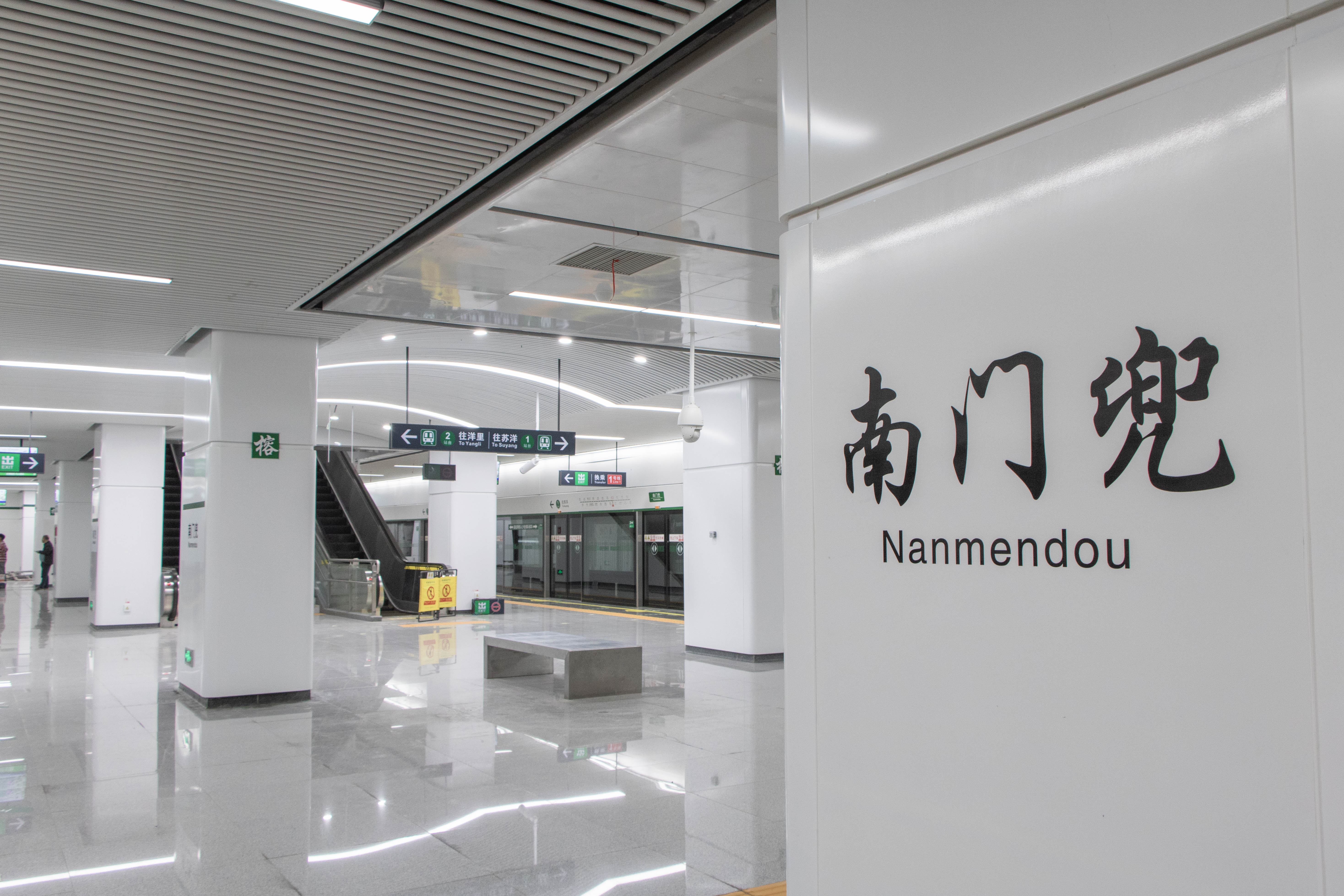 中文（中国大陆）: 南门兜站2号线站名壁